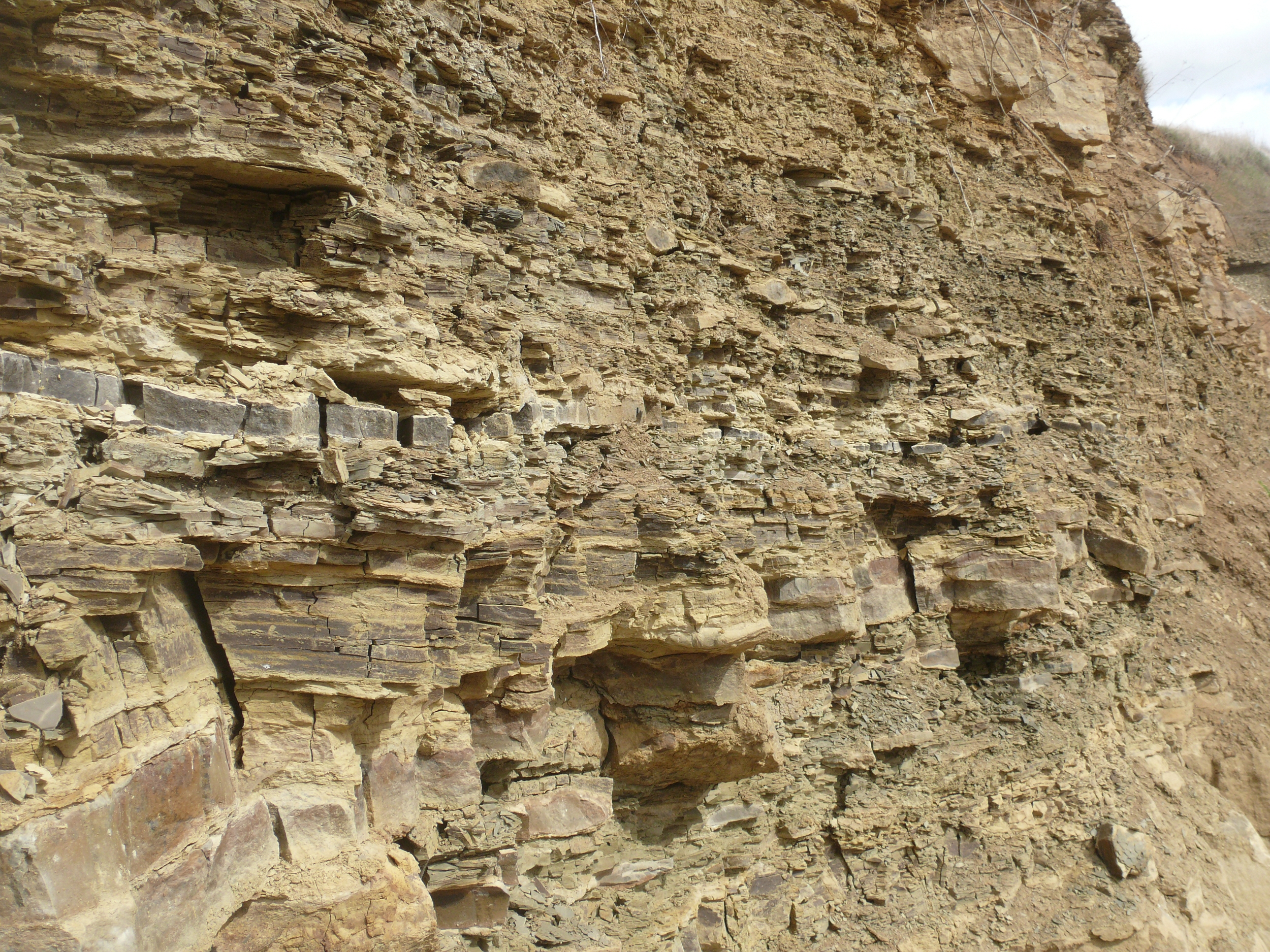 Bairdienton, Fränkische Grenzschichten (Wimpfen-Subformation?), Oberer Muschelkalk Tauberland, Deutschland